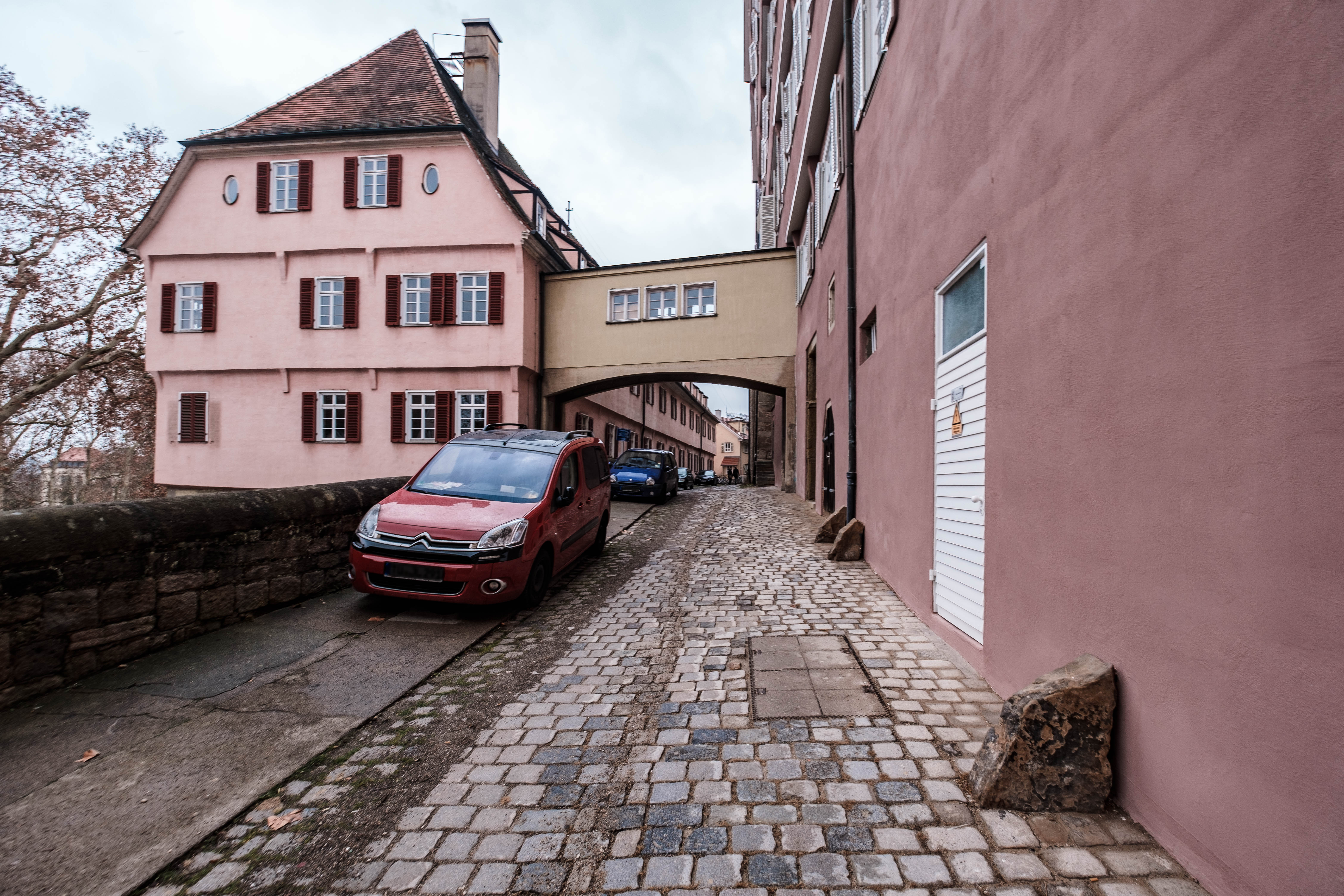 Alte Burse, gesehen von der Clinicumsgasse in Blickrichtung Westen